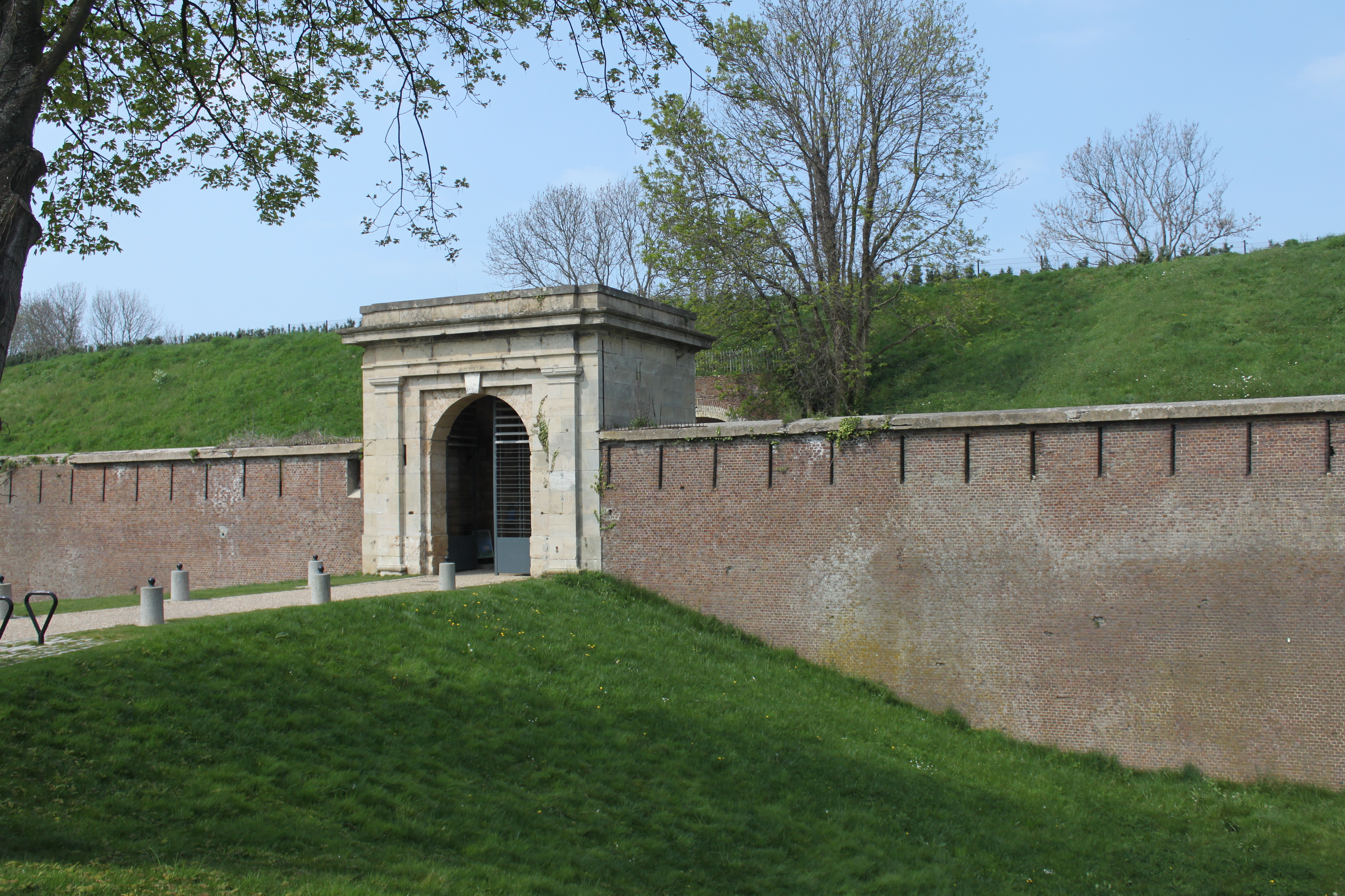 le havre entrée du fort de saint adresse